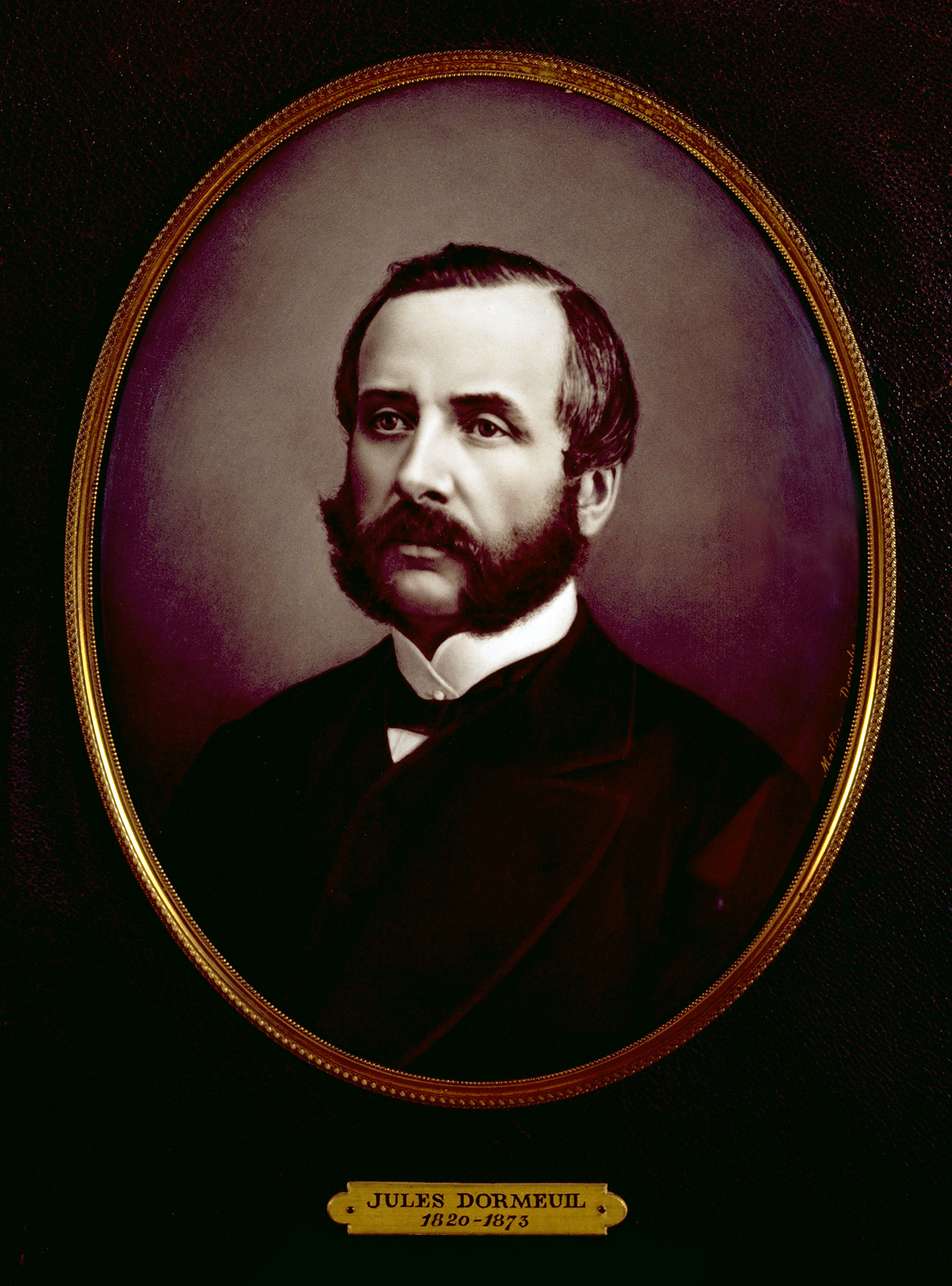 Jules Dormeuil, fondateur de l'entreprise de tissus Dormeuil en 1842